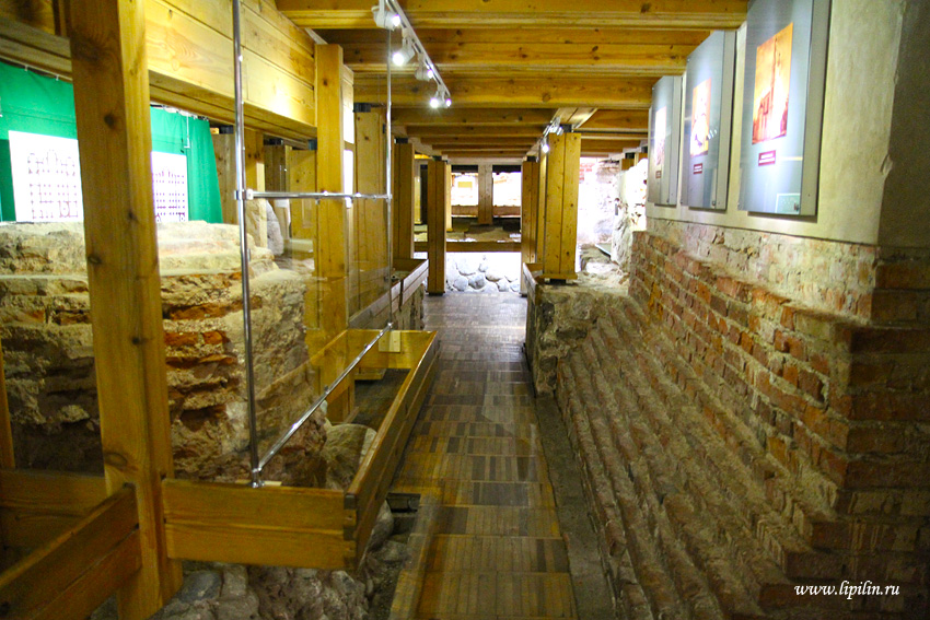 Полацк. Музей гісторыі архітэктуры Сафійскага сабора